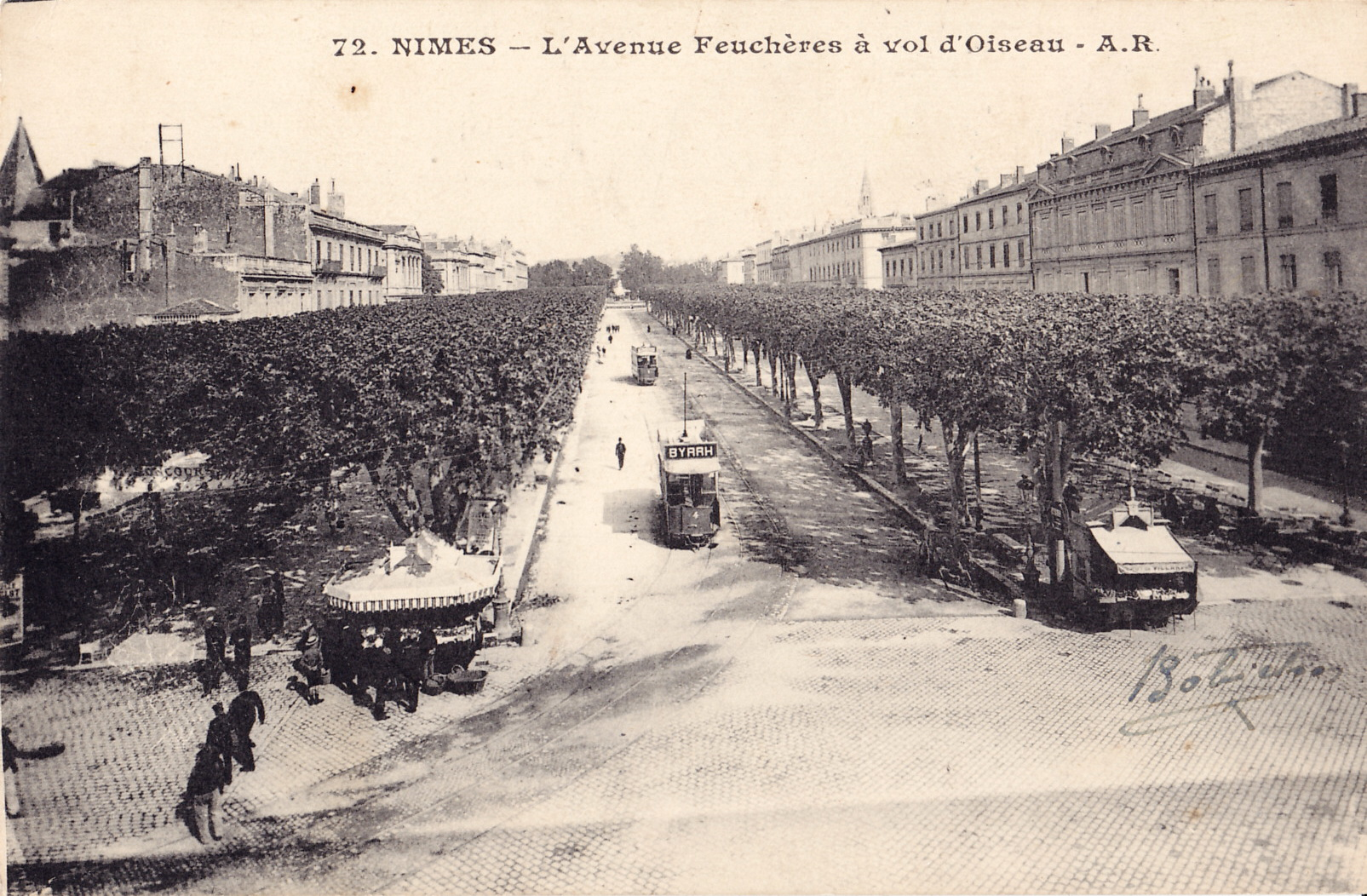 Carte postale ancienne éditée par AR, n°72 :NÎMES -L'Avenue Feuchère à vol d'Oiseau